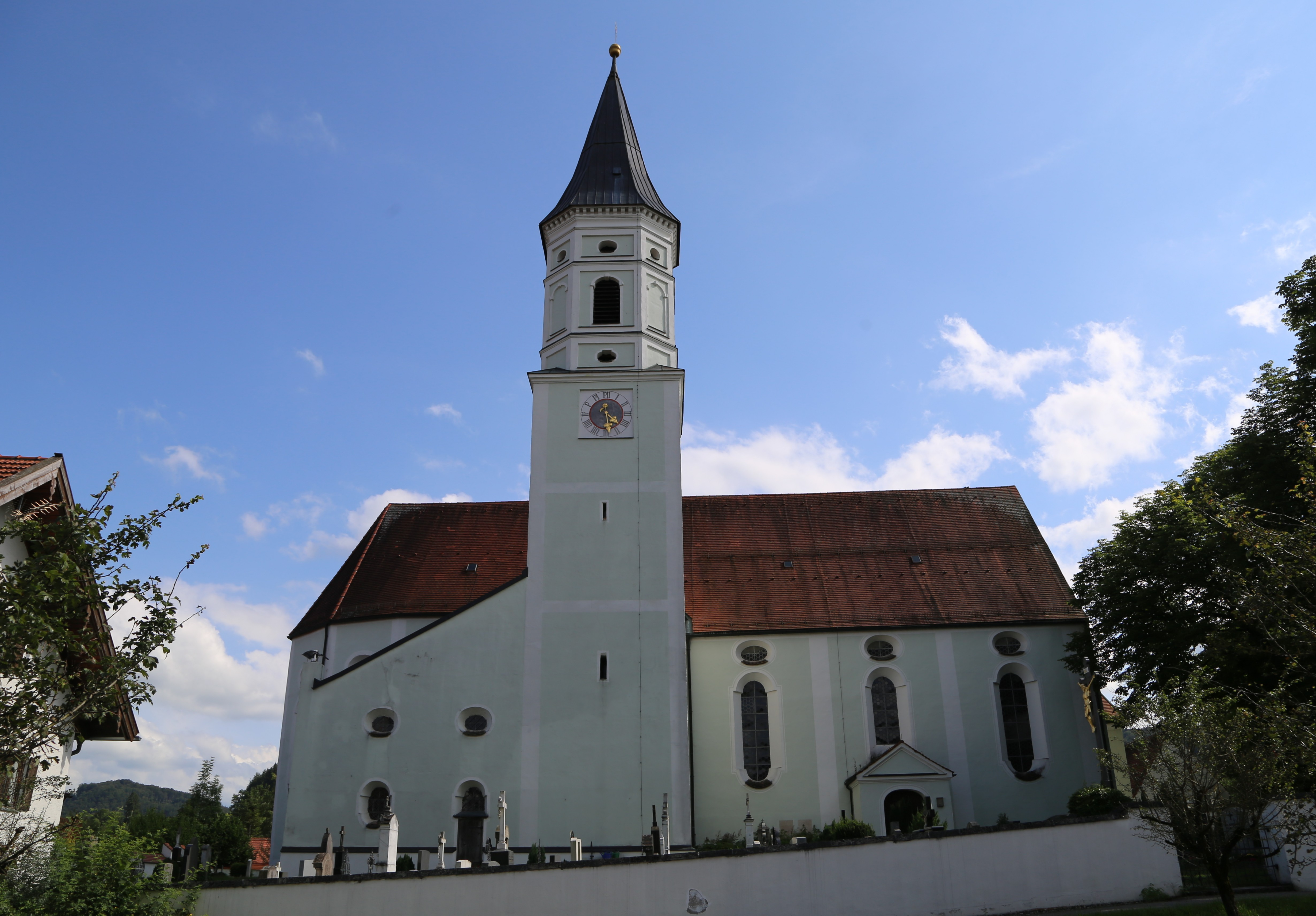 Hauptstraße 2, Habach; St. Ulrich, ehemalige Kollegiats-Stiftskirche, jetzt katholische Pfarrkirche, 1663 und Folgejahre errichtet, Turmunterbau mittelalterlich; mit Ausstattung. – Beinhaus mit Pultdach, 17. Jahrhundert; südlich der Kirche. - Ost-, Süd- und Westseite der Friedhofsmauer, wohl 17. Jahrhundert.